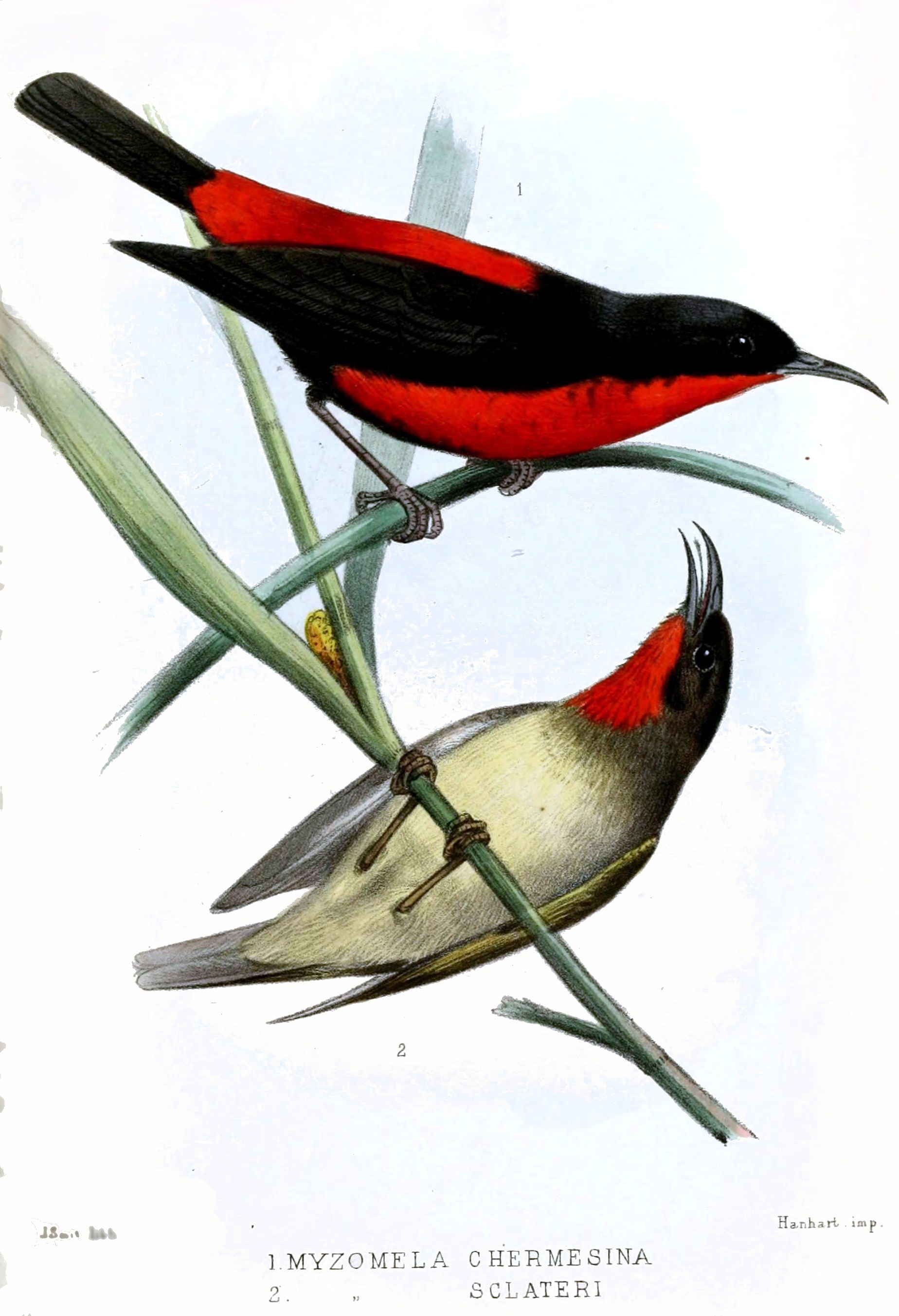 Myzomela chermesina and M. sclateri